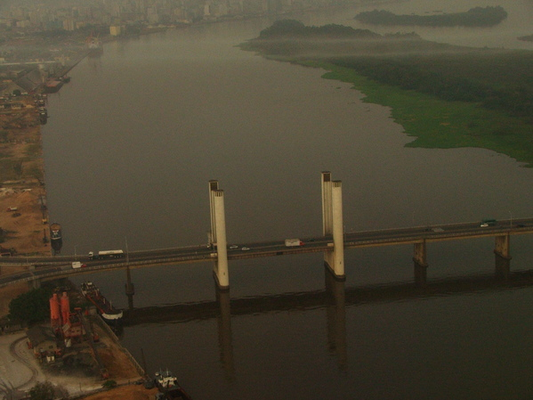 Lift bridge of Porto Alegre, Rio Grande do Sul, Brazil.